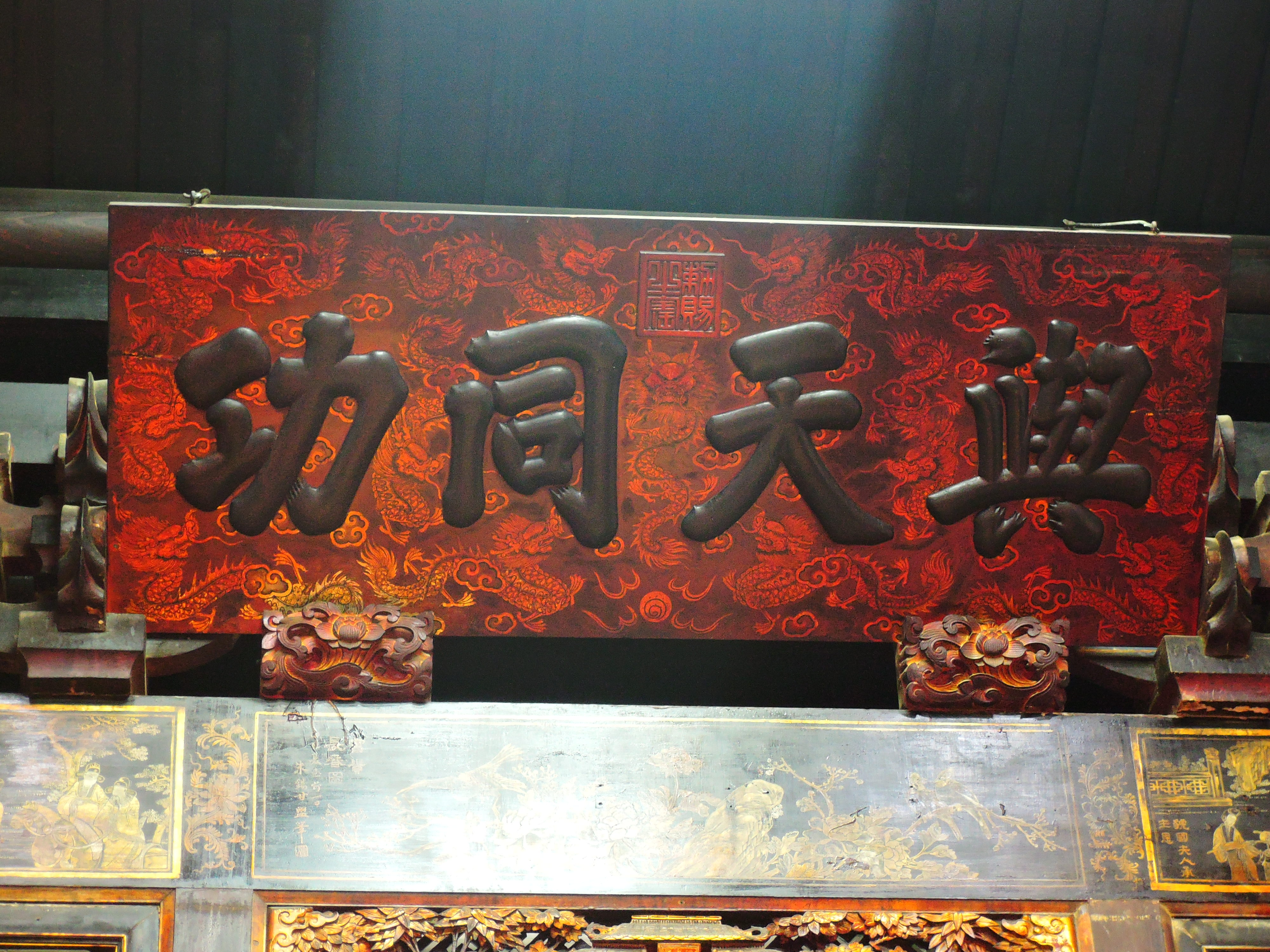 中文（台灣）: 原匾為康熙皇帝九龍紋底御賜，但在清法戰爭時此匾亡佚，今匾遽聞是大正年間重修期間仿製的十三龍紋底。